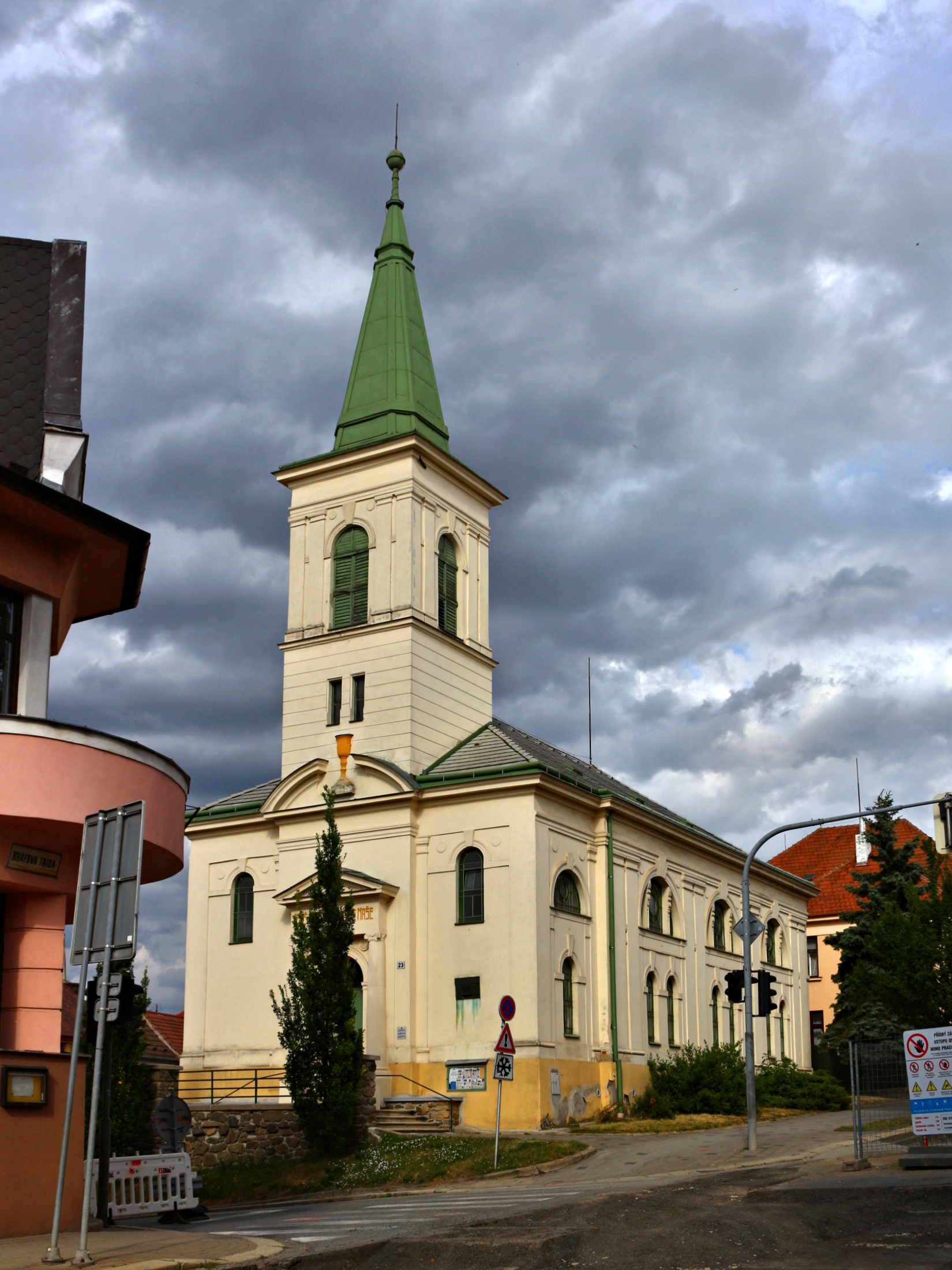 Evangelický kostel v Třebíči